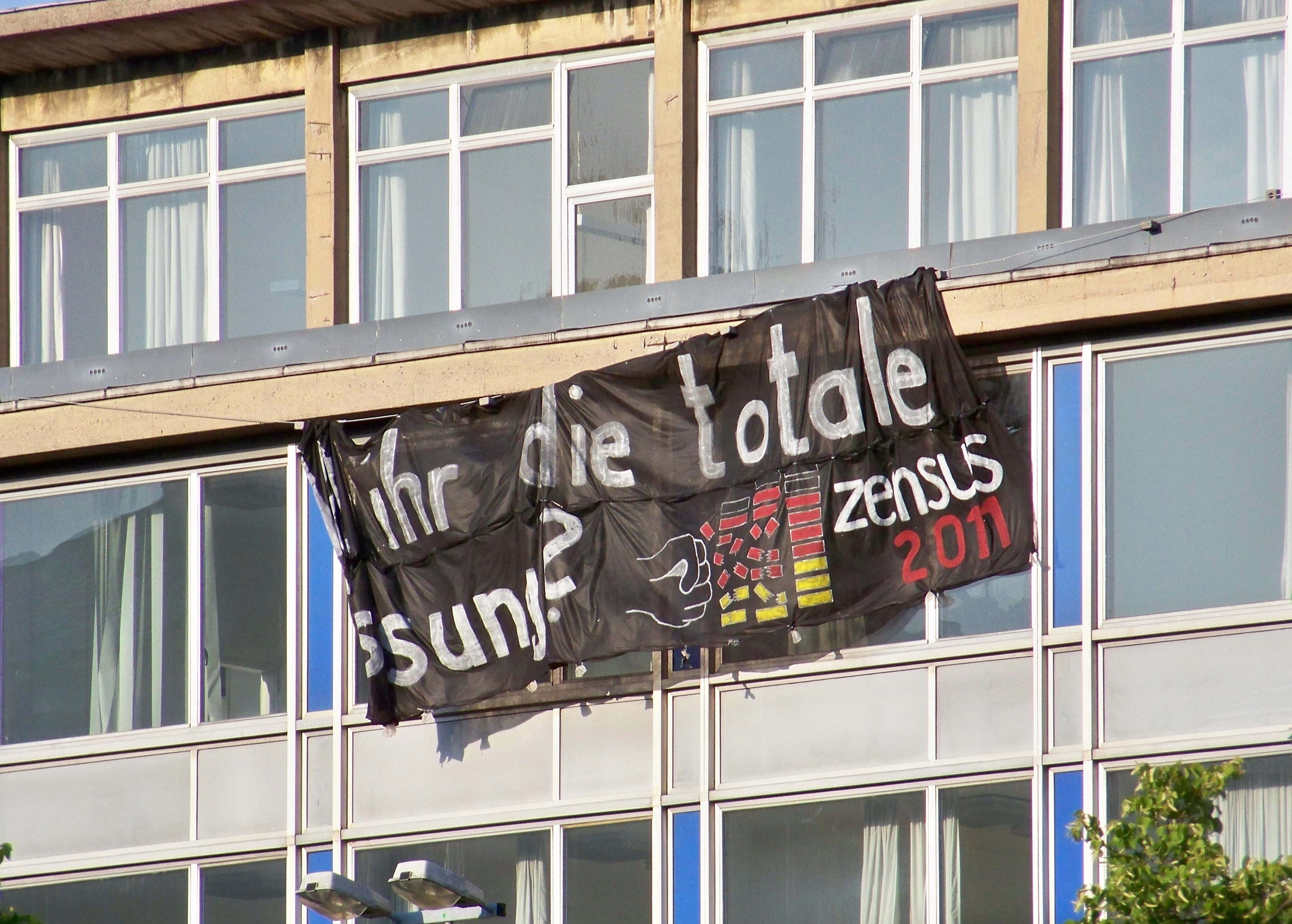 Protestbanner gegen die Volkszählung "Zensus 2011", angebracht an der alten Hauptpost am Augustusplatz. Aufschrift: "Wollt ihr die totale [Erfa?]ssung"?